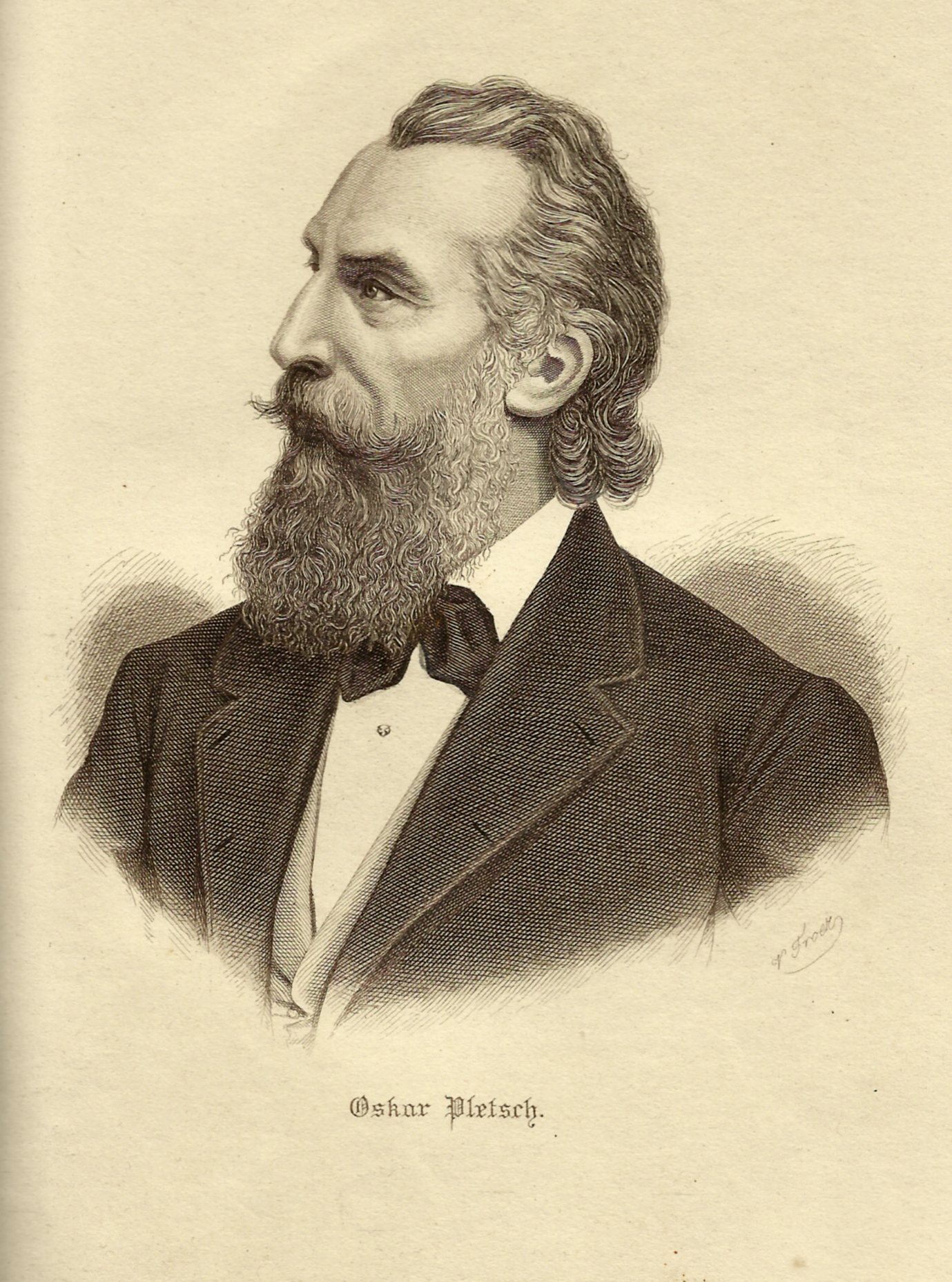 Portrait Oskar Pletsch, Stahlstich, um 1888